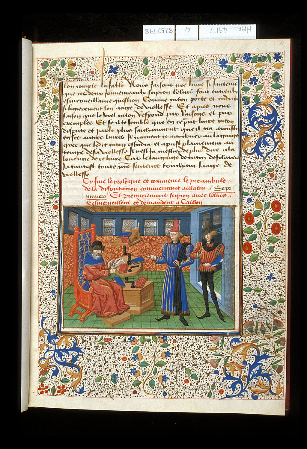 BL Harley 4917 Cicéron Fol 4 Caton avec Scipio Africanus et Gaius Laelius Sapiens